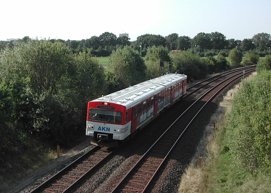 Ein VTA-Triebwagen der AKN auf der Stammstrecke Neumünster-Hamburg. Aufgenommen von der Brücke Feldstraße mit Blick in Richtung Norden.